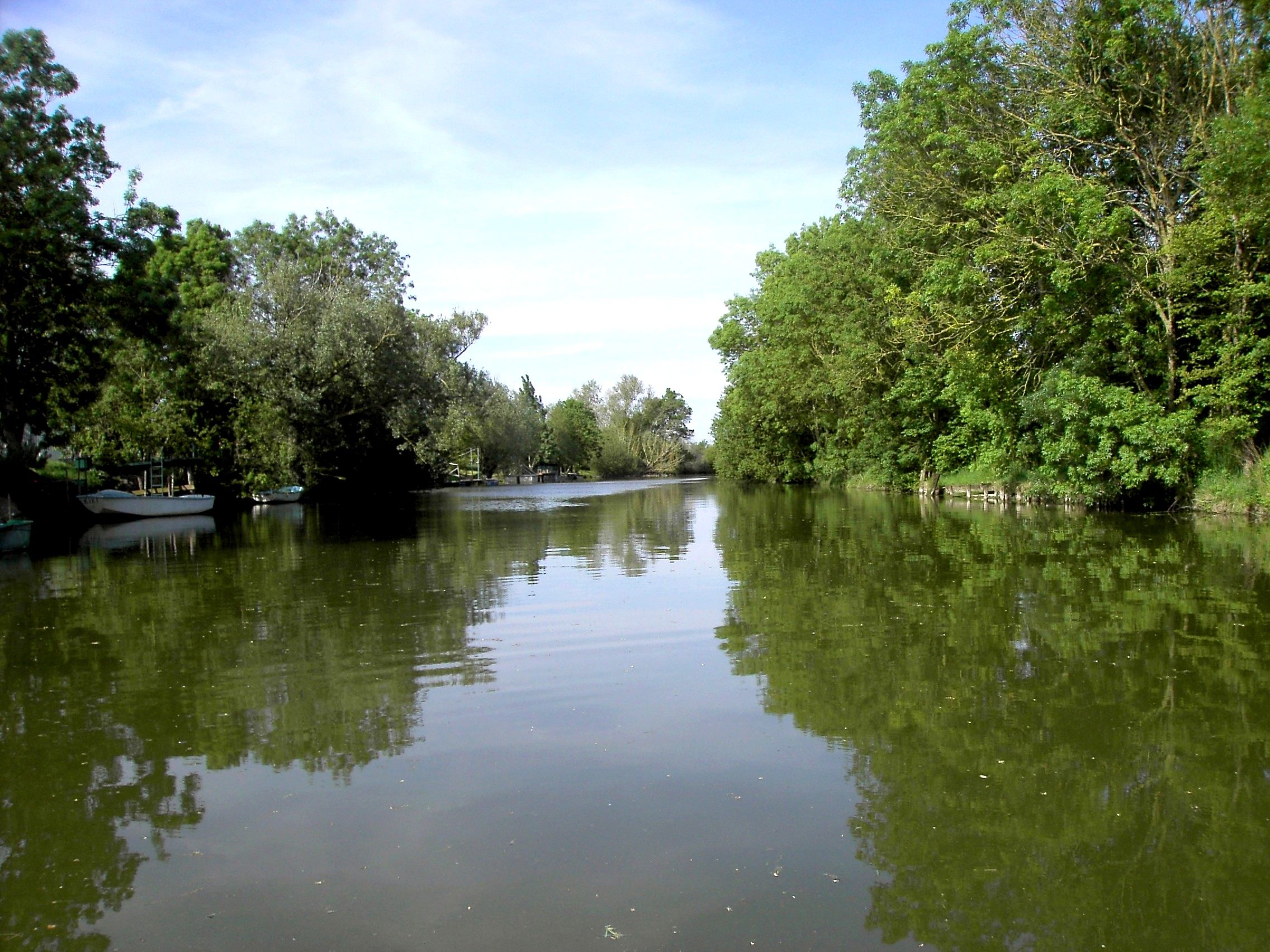 La rivière Vendée coule et traverse le village pour aller se jeter dans le fleuve Sèvre Niortaise au lieu dit "Le Gouffre' ouvrage hydraulique XVIIe